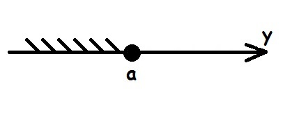 x ir vienāds vai mazāks nekā y